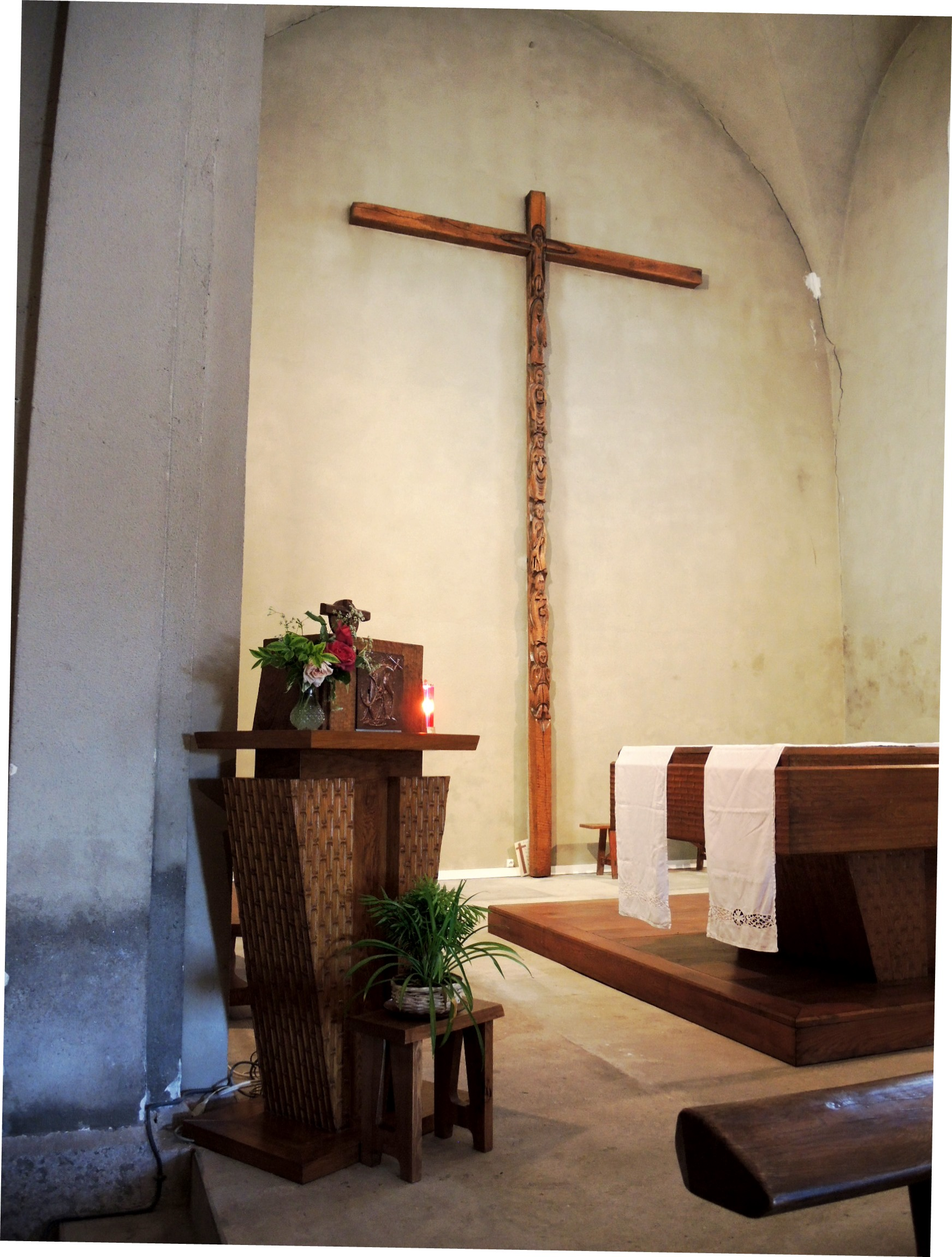 Colombier-le-Cardinal détail